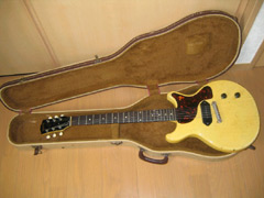 ( Description Gibson_59LesPaulJrDC_TV.jpg Date9 March 2008SourceOwn workAuthorPiraoOther versions Derivative works of this file: Gibson 59LesPaulJrDC TV.png Category:楽器の画像 Gibson_59LesPaulJrDC_TV.jpg